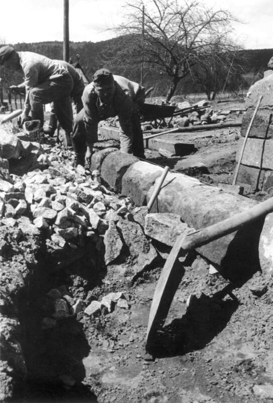 Bergzabern 20.4.40 Straßenbau-Pioniere und Arbeiter der Org. Todt bessern Straßen aus, die beim Bau des Westwalles durch starke Inanspruchnahme Not litten. Prop-Kp. 612 Bildberichter: Erich Bauer